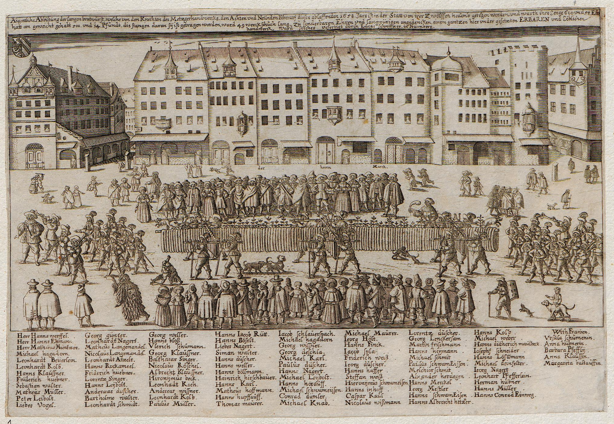 Grafik aus dem Klebeband Nr. 15 der Fürstlich Waldeckschen Hofbibliothek Arolsen Motiv: Eigentliche Abbildung der langen bratwurst, welche von den Knechten des Metzgerhandwercks, den Achten und Neünden Feberarj dieses ablaffenden 1658. Jars ist in der Statt von irer Zwölffen herumb getragen worden, vnd warth ihre Lenge 600 vnd 58 Eln, hatt am geweicht gehabt 500 vnd 14 Pfundt, die stangen daran sij ist getragen worden, ward 49 werck schuch lang, zu sonderbaren Ehren vnd langwürigen angedencken, einem gantzen hiervnder gesetzten ERBAREN vnd Löblichen handwerck, ward solches verfertigt durch Lucas Schnitzer in Nürnberg""